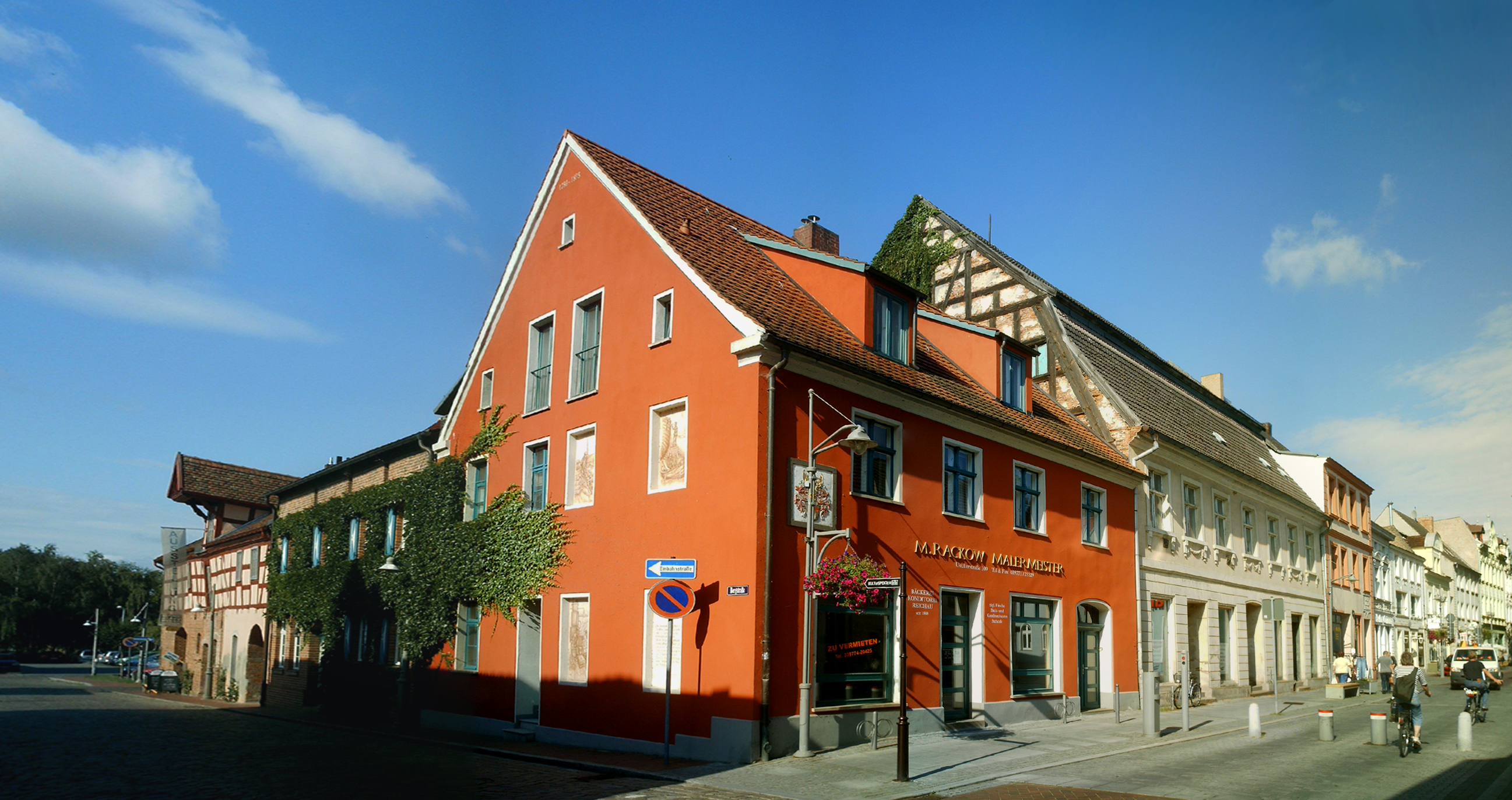 Ueckerstraße Ecke Bergstraße